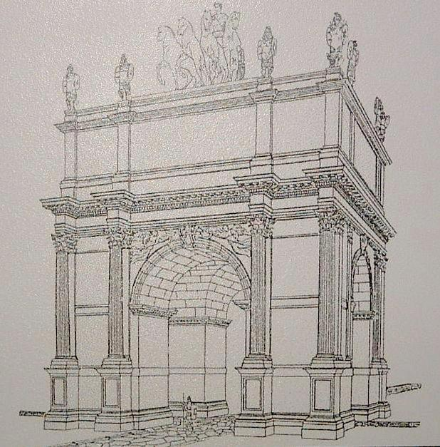 Ricostruzione grafica arco di Malborghetto di Fritz Toebelmann (1874–1914)